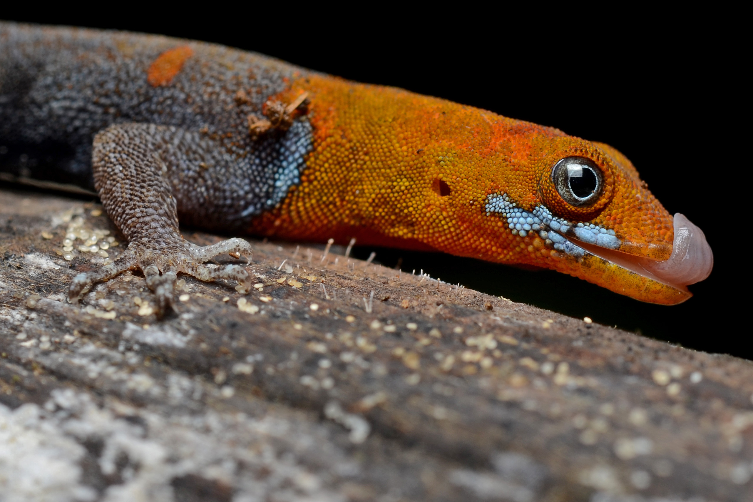 Gecko